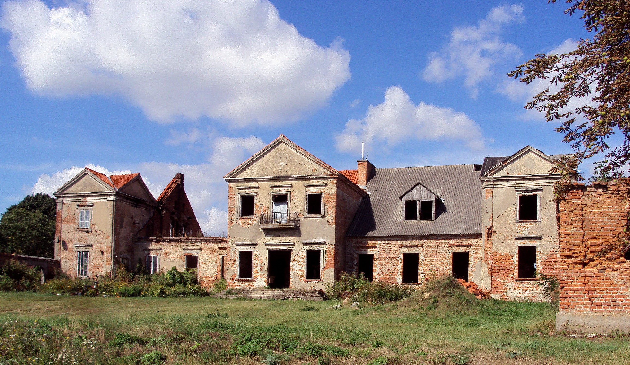 Radziki Małe, ruina pałacu, k. XVIII; 2 oficyny, XVII-XIX